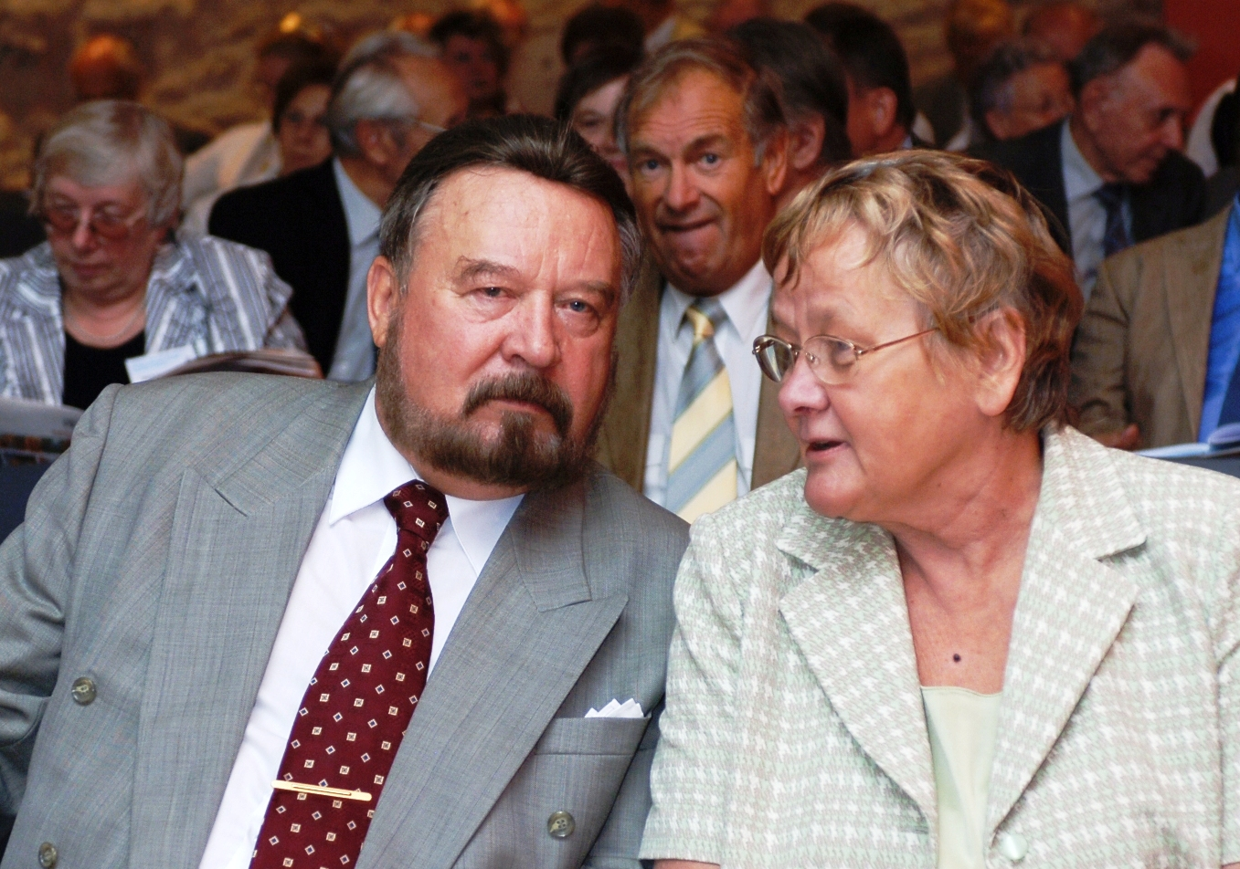 20. Augusti Klubi korraldatud konverents "Riikliku iseseisvuse taastamine parlamentaarsel teel aastatel 1990 - 1992" Eesreas Ülo Nugis ja Ene Ergma, taga Marju Lauristin ja Tiit Made.